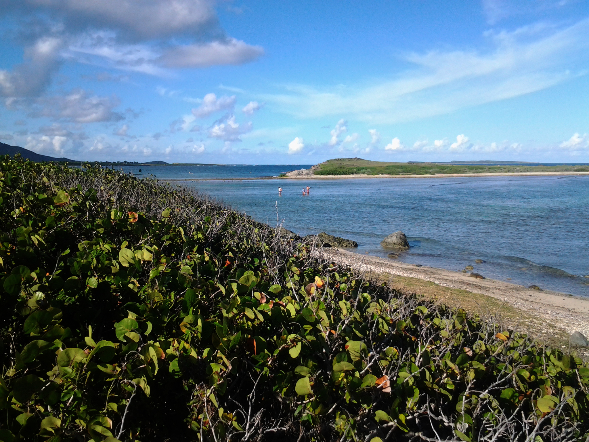 Baie de l'Embouchure